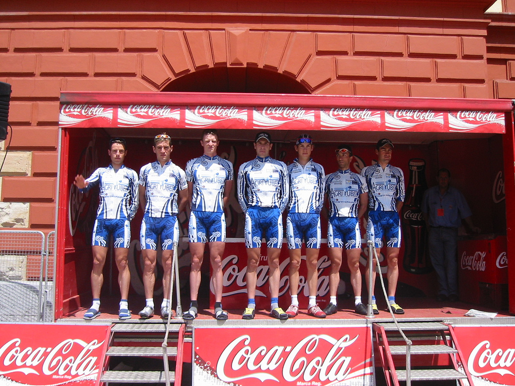 Agritubel, Euskal Bizikleta 2005